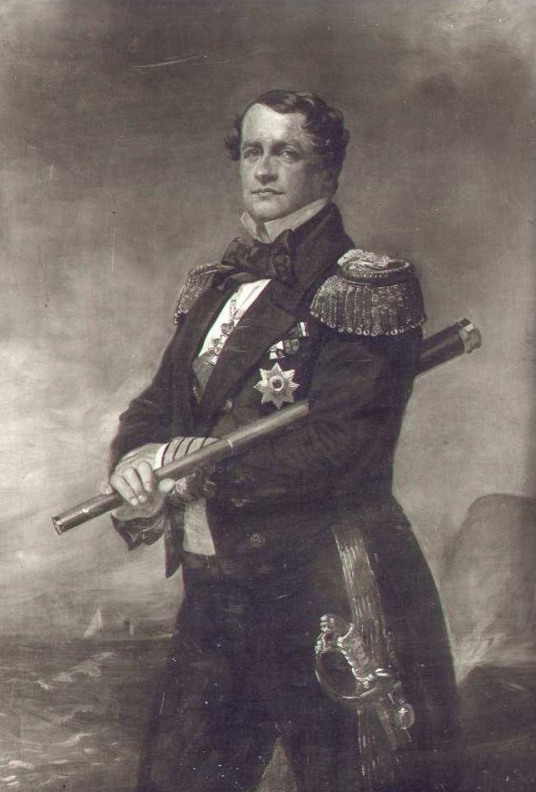 Adalbert von Preußen (* 29. Oktober 1811 in Berlin; † 6. Juni 1873 in Karlsbad)